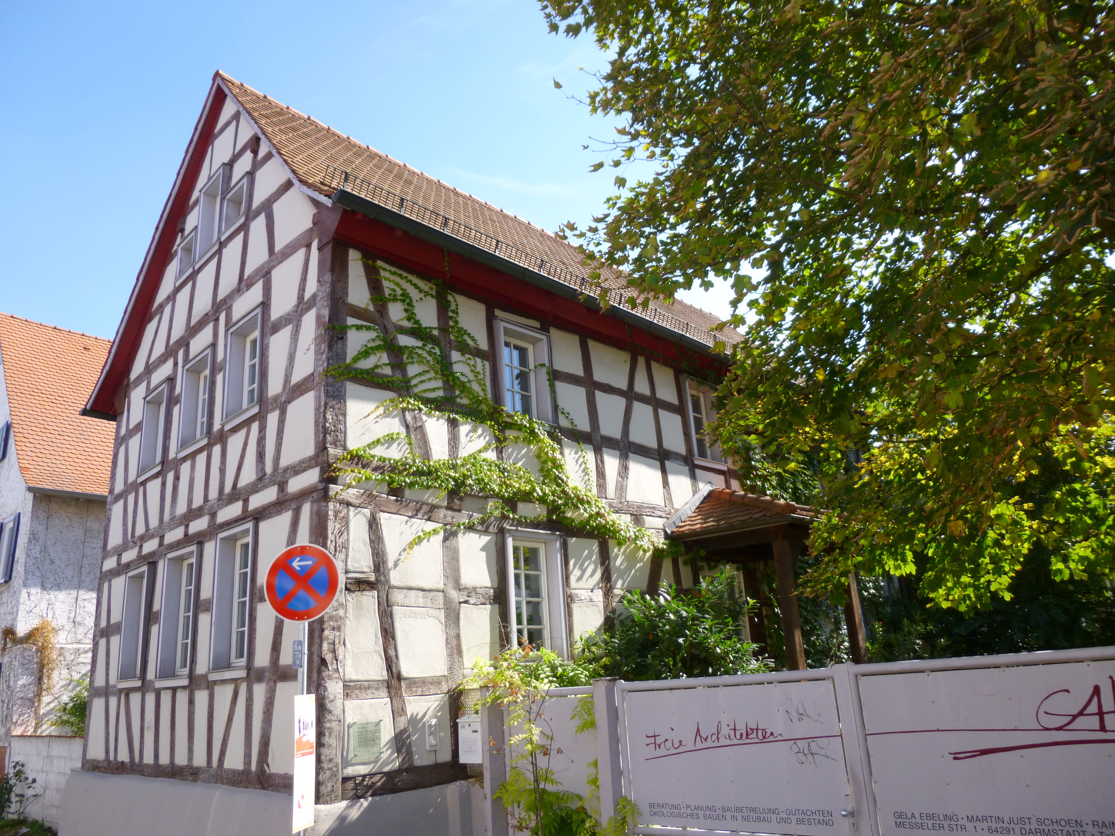 historia trabfaka domo "Schreiberpforte" (Messeler Straße 1) en Darmstadt-Arheilgen